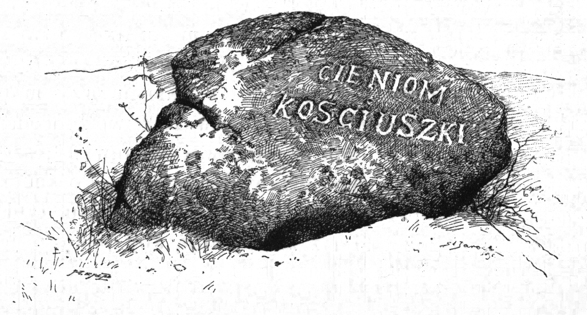 Беларуская (тарашкевіца): Залесьсе (Zaleśsie), камень Касьцюшкі (Kaściuška)